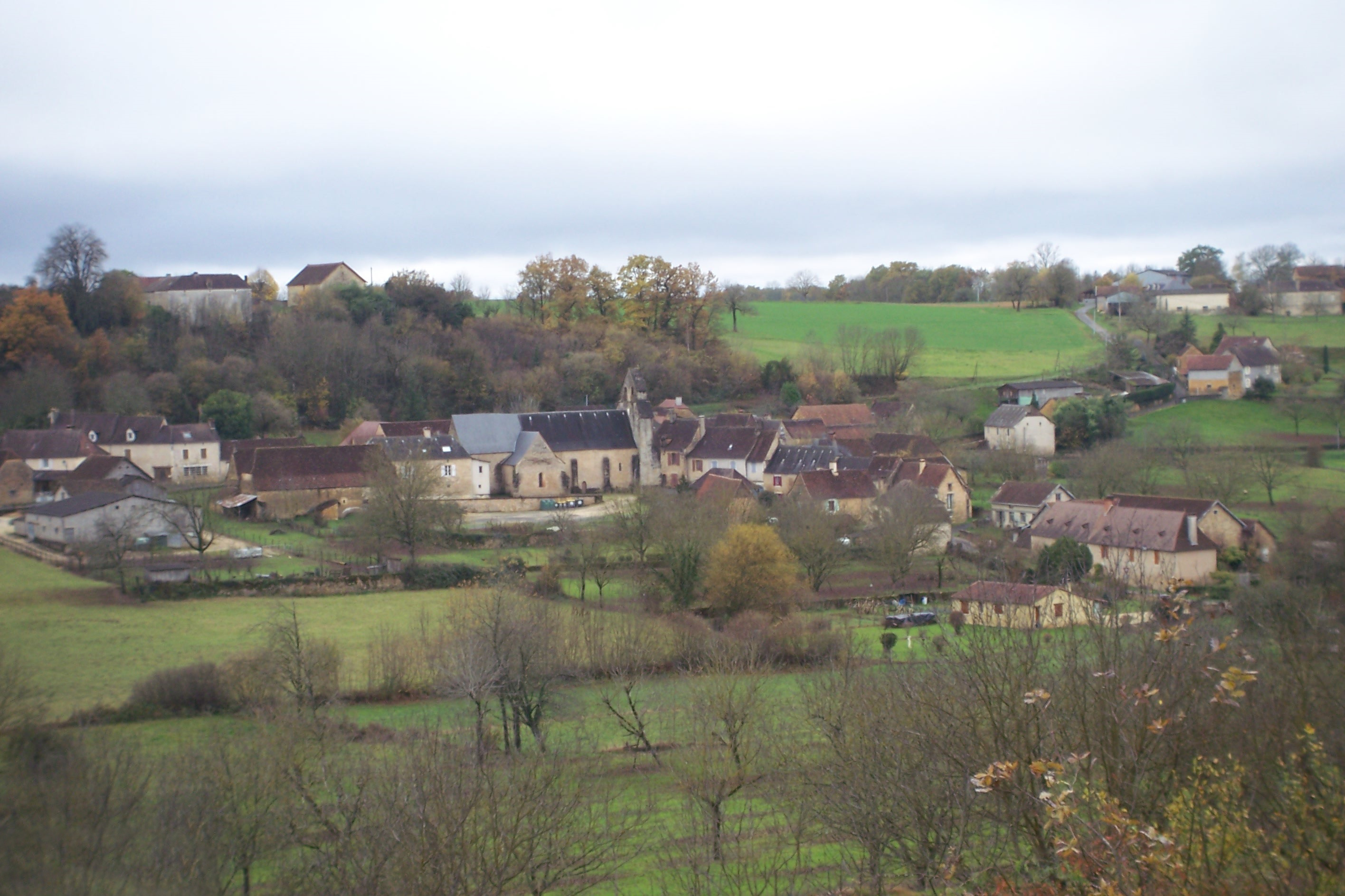 vue du versant sud du bourg de Granges d'Ans - Dordogne - France